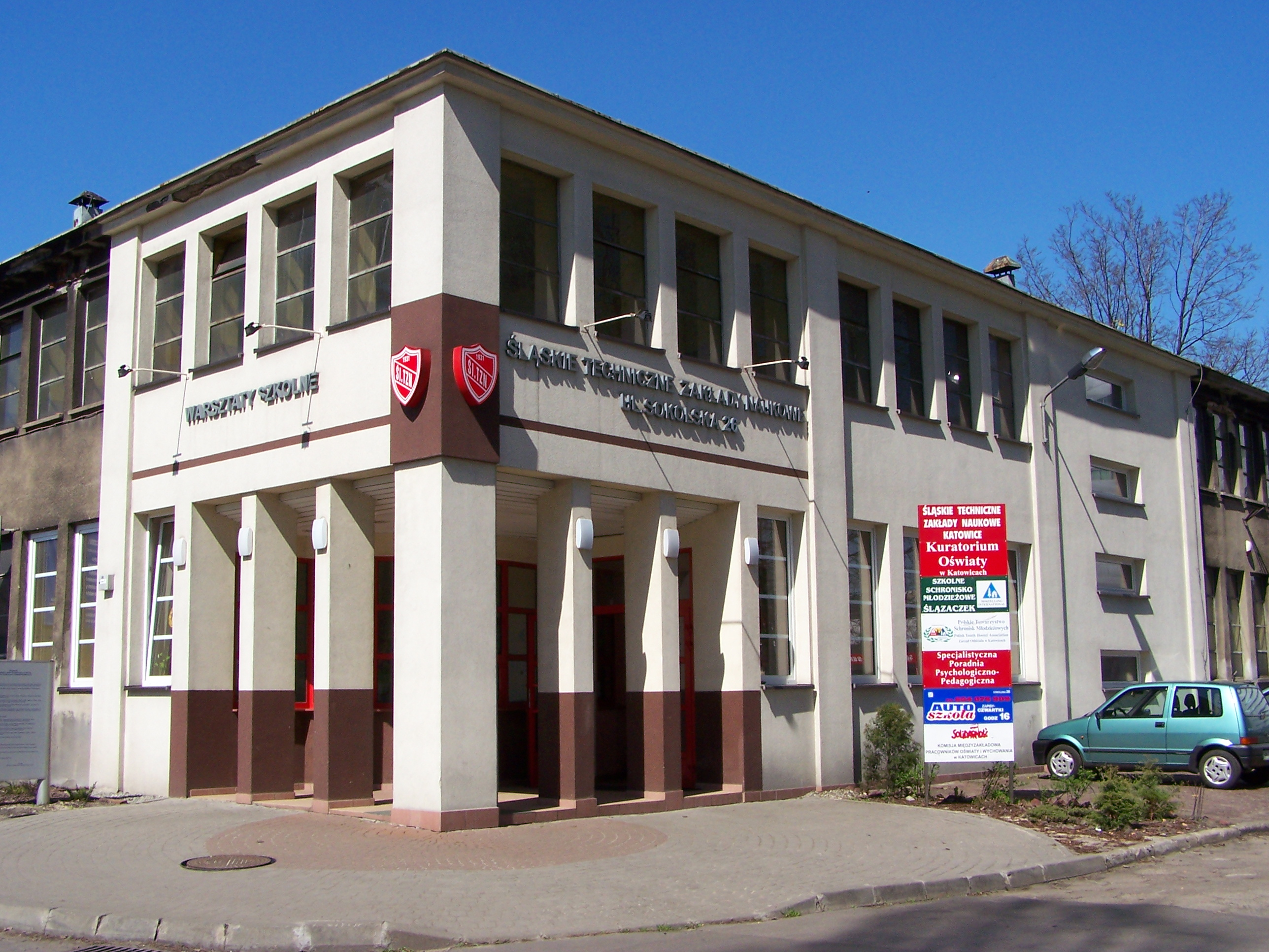 Śląskie Techniczne Zakłady Naukowe (wejście do budynku) w Katowicach przy ul. Sokolskiej.